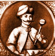 Портрет гетьмана І.Виговського з літопису Величка. 1720 р. Державна публічна бібліотека ім. М.Є.Салтикова-Щедріна, Санкт-Петербург